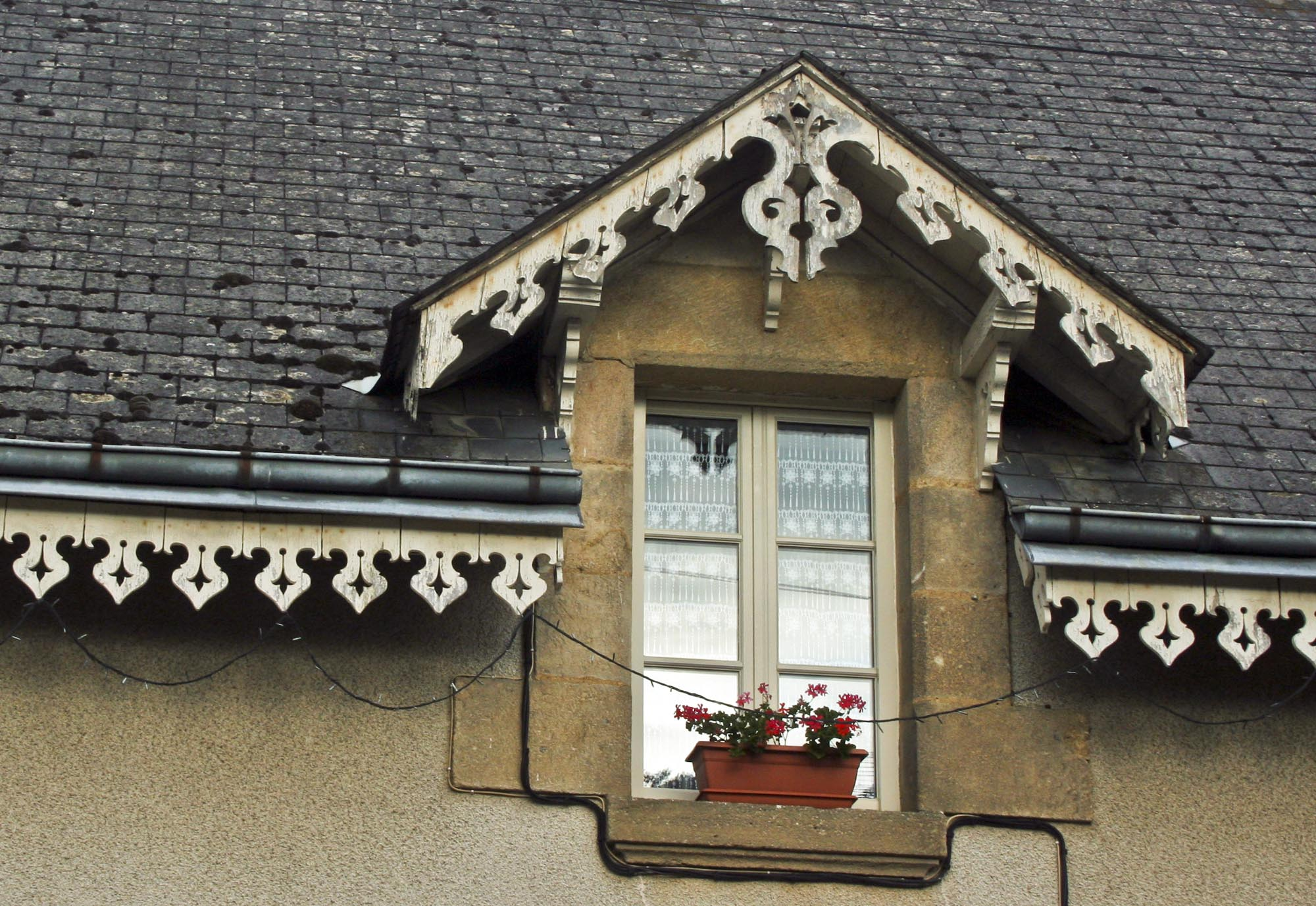 Lambrequins de toit, Sainte-Sévère (Indre), France